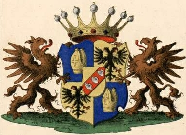 Vietinghoff gen. Scheeli suguvõsa vabahärravapp